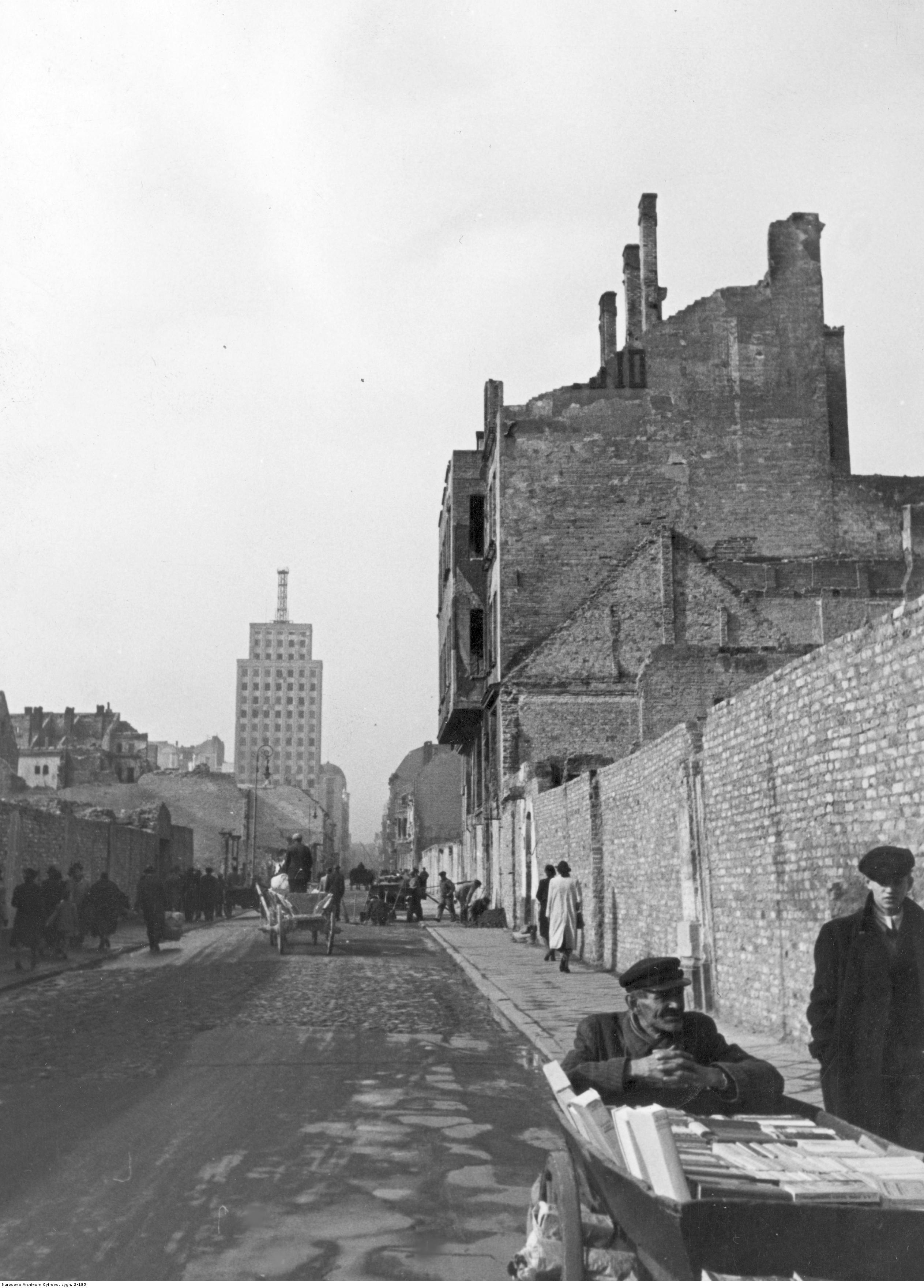 Ul. Świętokrzyska od ul. Nowy Świat w kierunku ul. Marszałkowskiej. Widoczne zniszczenia wojenne i gmach Prudentialu.